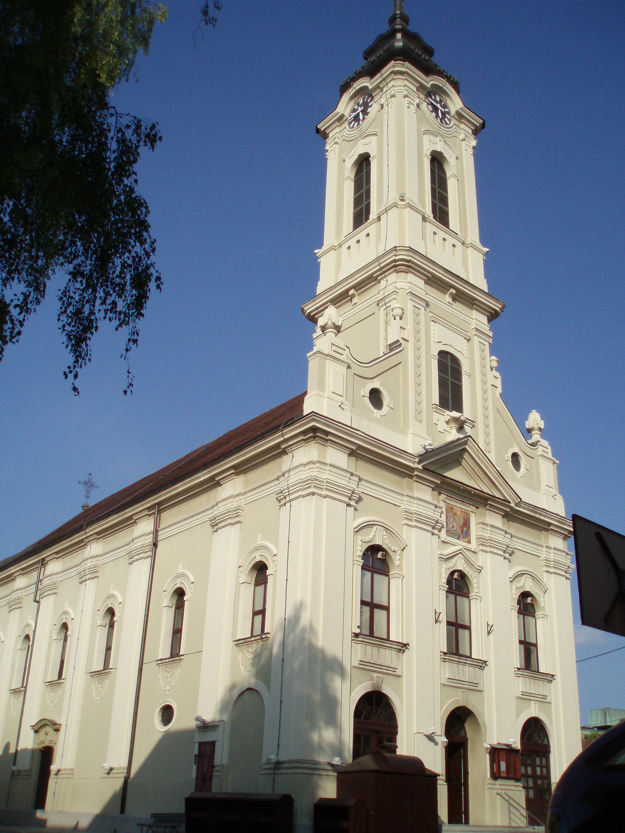 Богородична црква у Земуну - Предња фасада са торњем, аутор:Nicolo